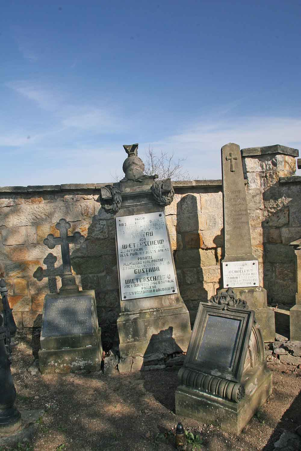 pomníky z války roku 1866 v Hořicích